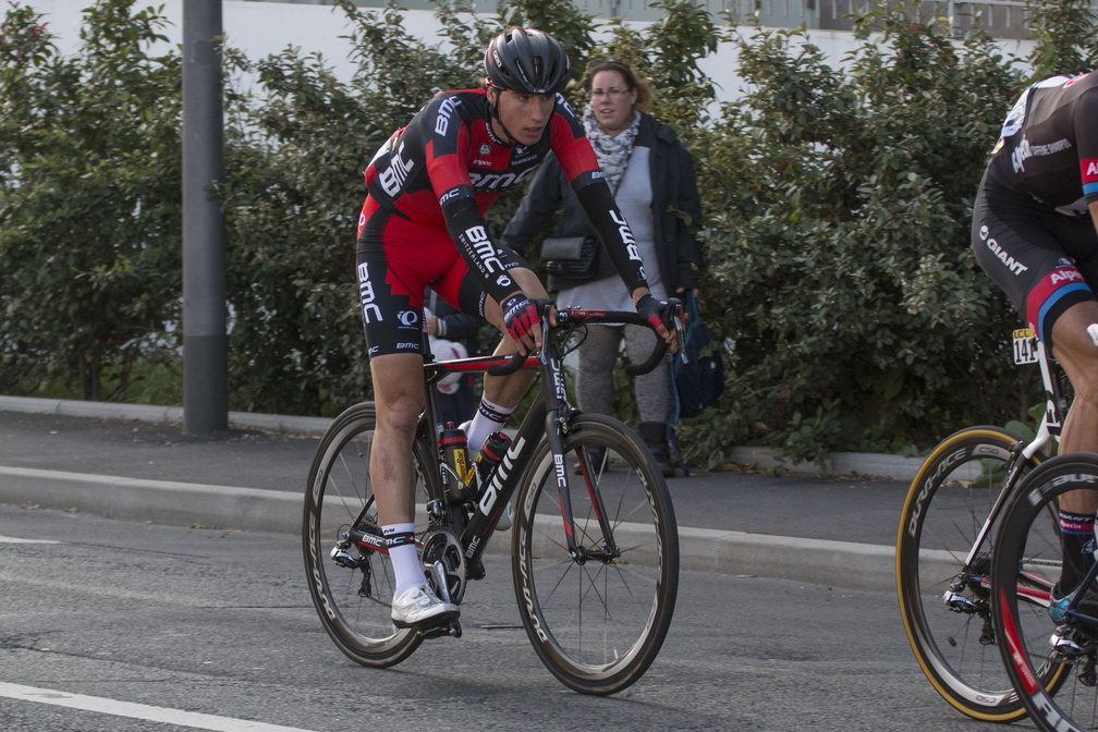 Tom Bohli durant le Paris Tours 2015